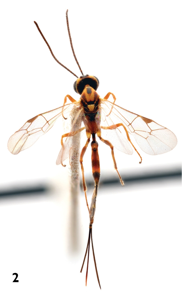 Schlupfwespe, Unterfamilie Cremastinae, Temelucha rea, Habitus von dorsal, aus der Originalbeschreibung, aus Malta